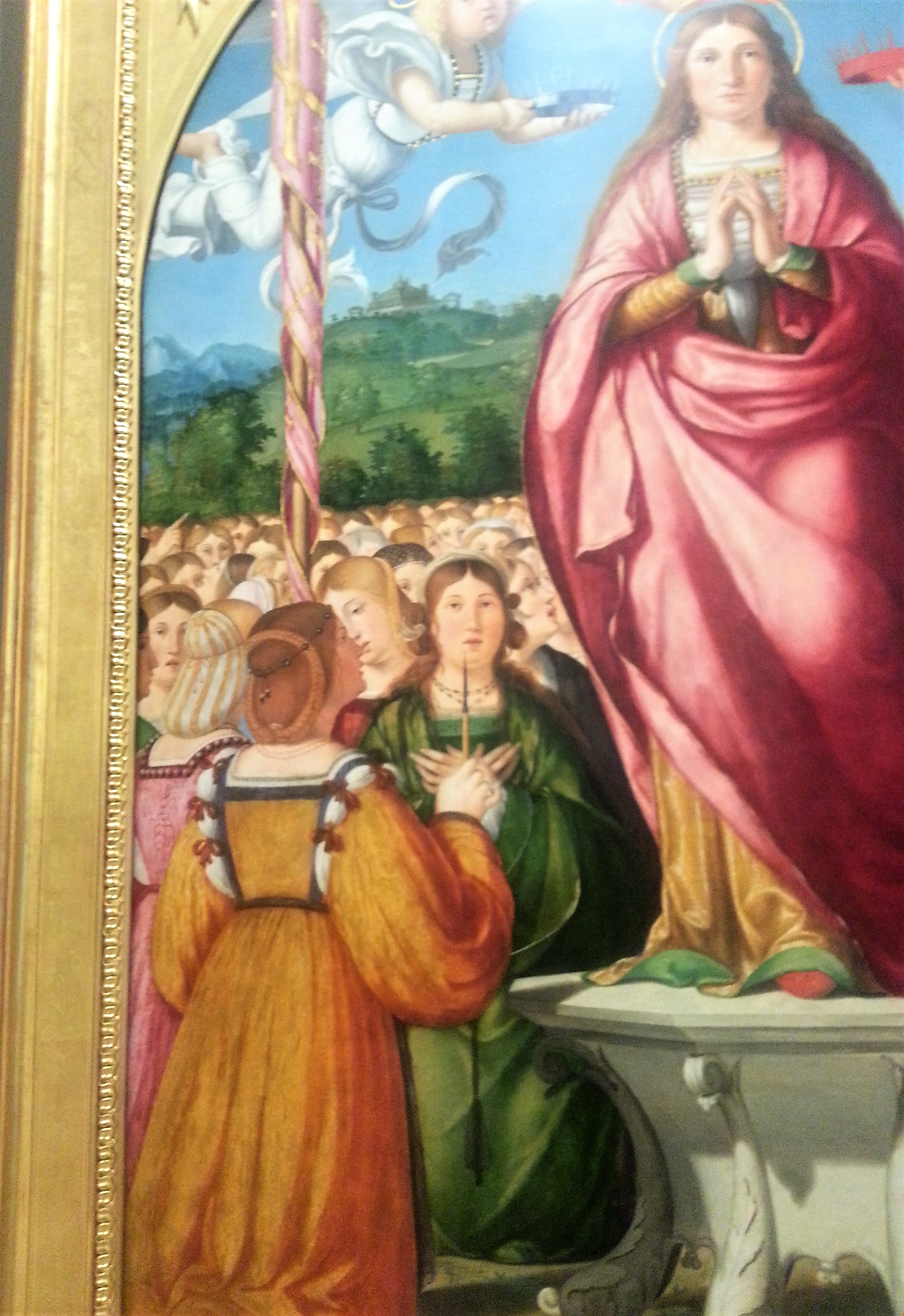 Particolare del dipinto su tavola di Andrea Previali sant'Orsola in gloria